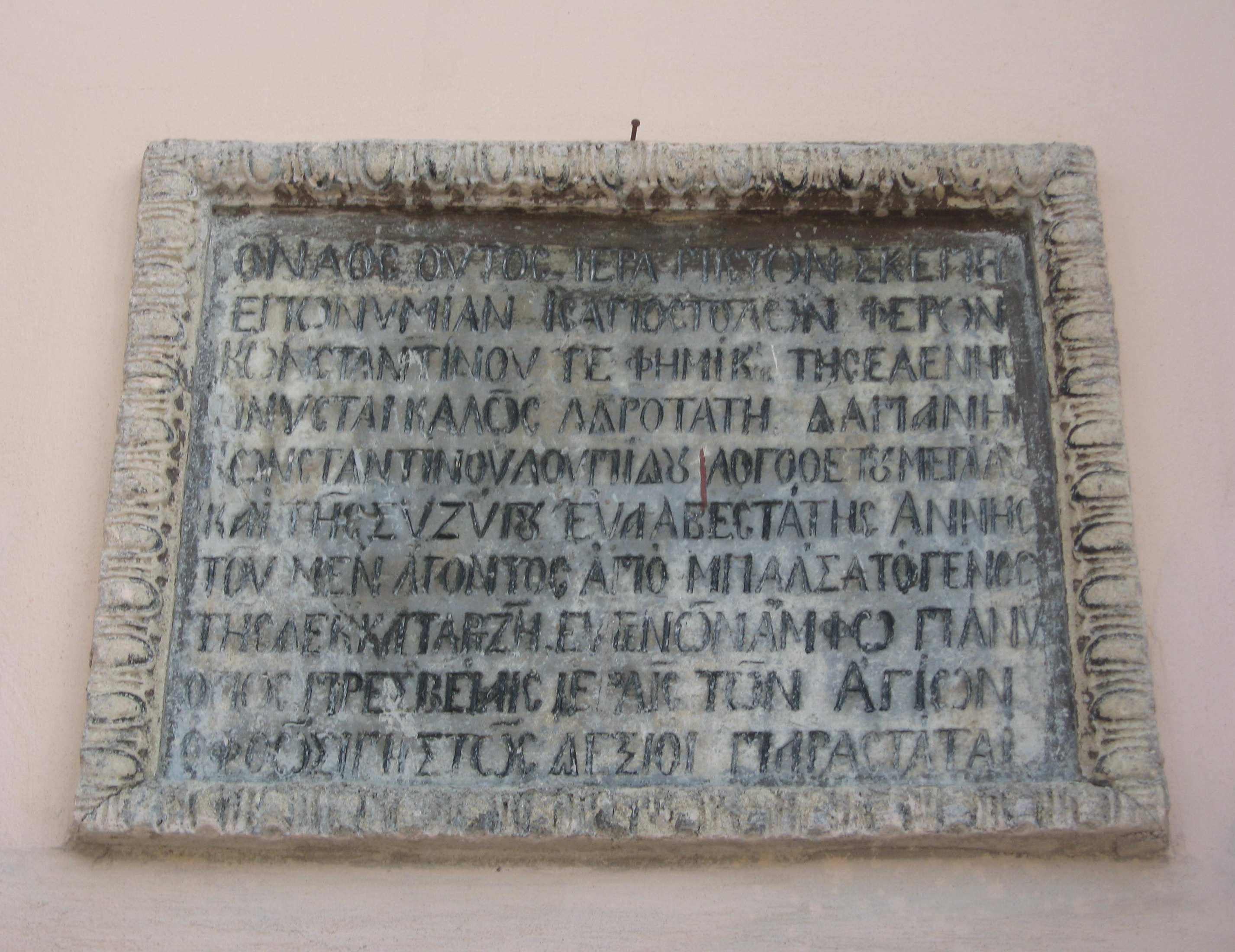 Biserica rotundă din Leţcani